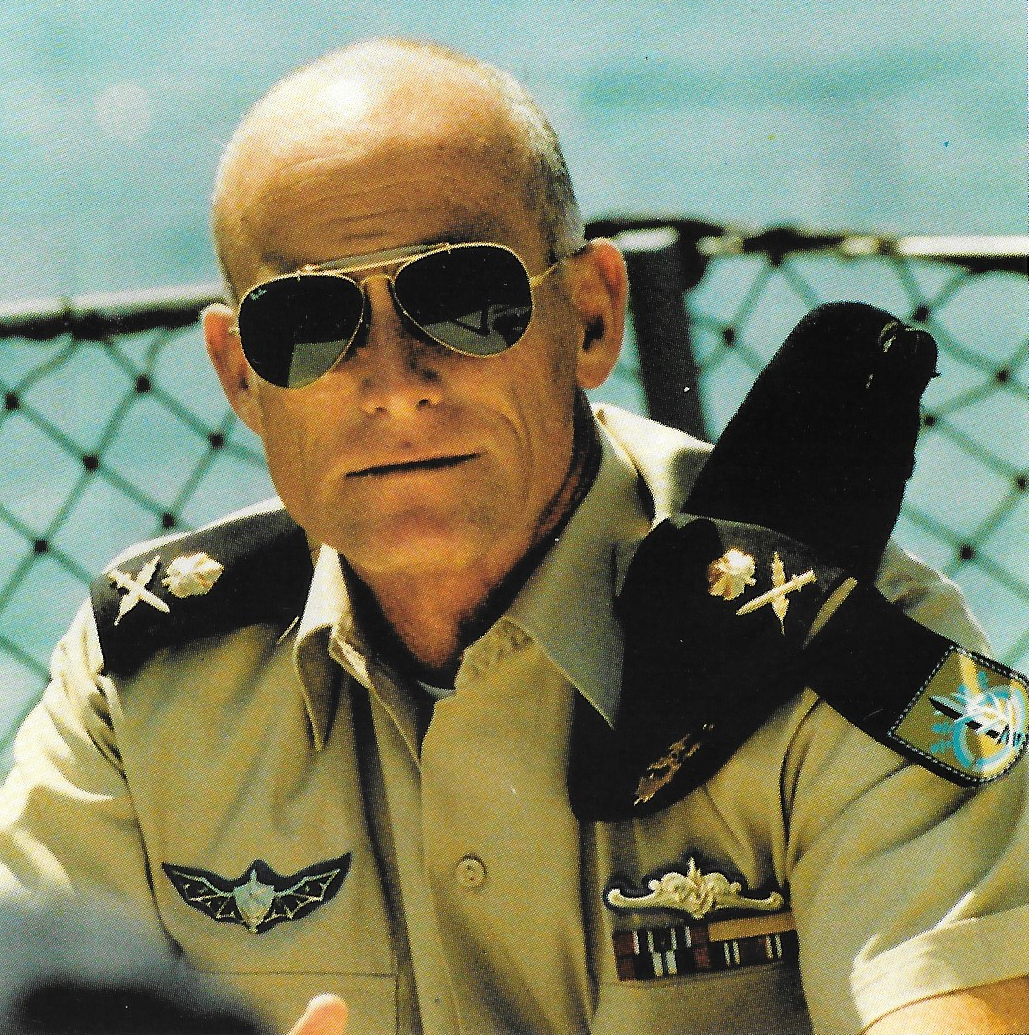 אלוף עמי אילון 1998